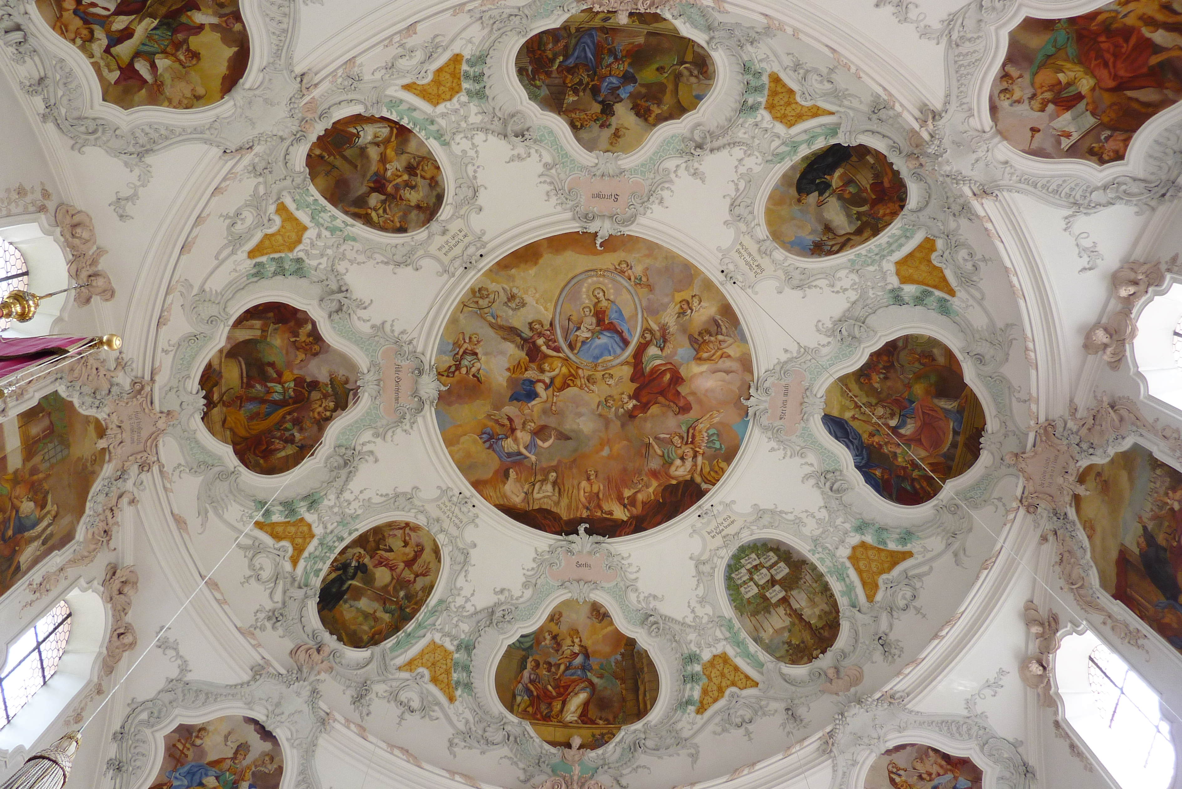 Katholische Pfarrkirche St. Martin in Gabelbach, einem Ortsteil von Zusmarshausen im Landkreis Augsburg (Bayern), Deckenfresko der Langhauskuppel von Alois Mack, Stuckdekor von Johann und Ignaz Finsterwalder, von 1738 (überarbeitet)